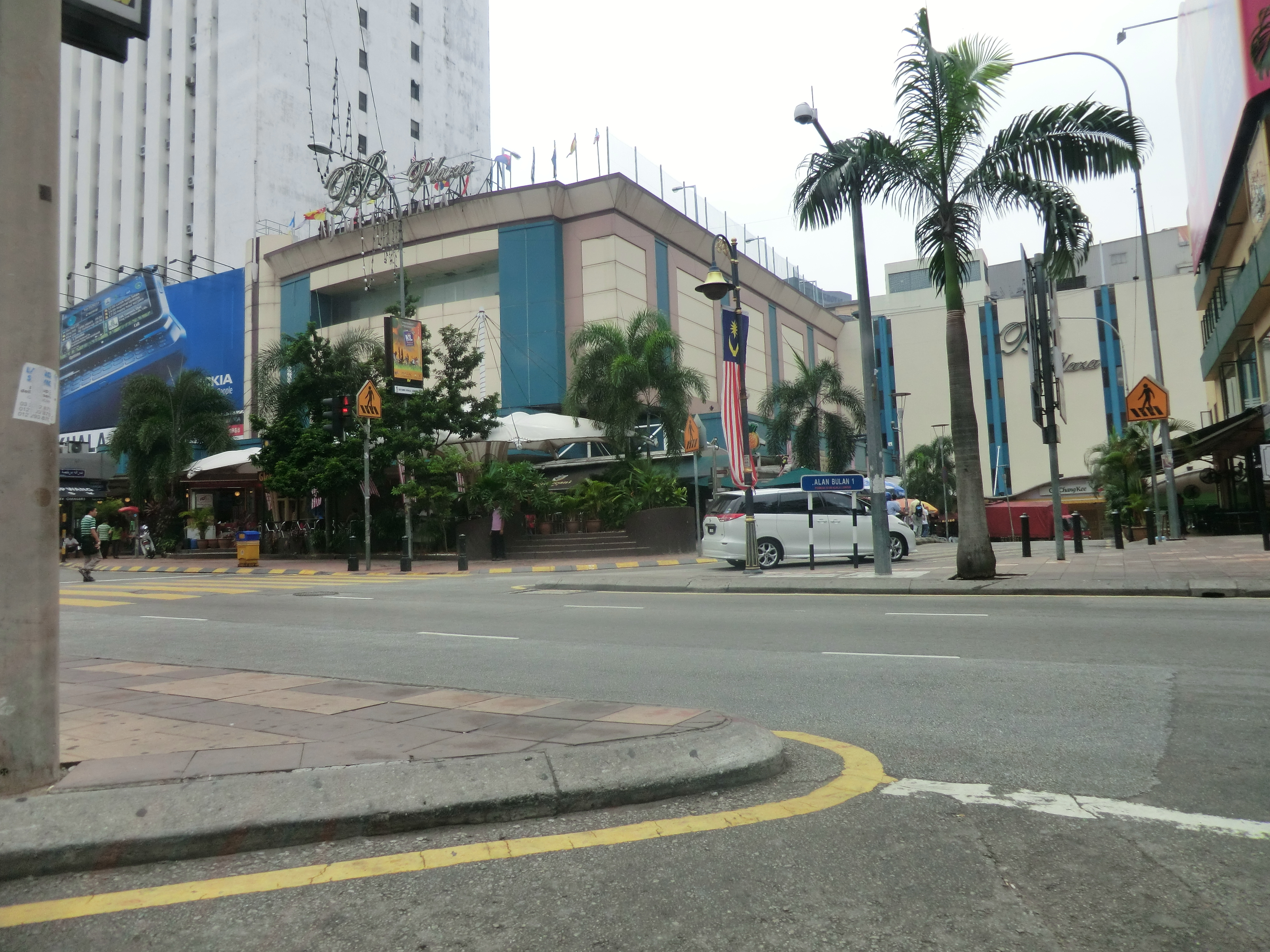 Bukit Bintang, Kuala Lumpur, Federal Territory of Kuala Lumpur, Malaysia